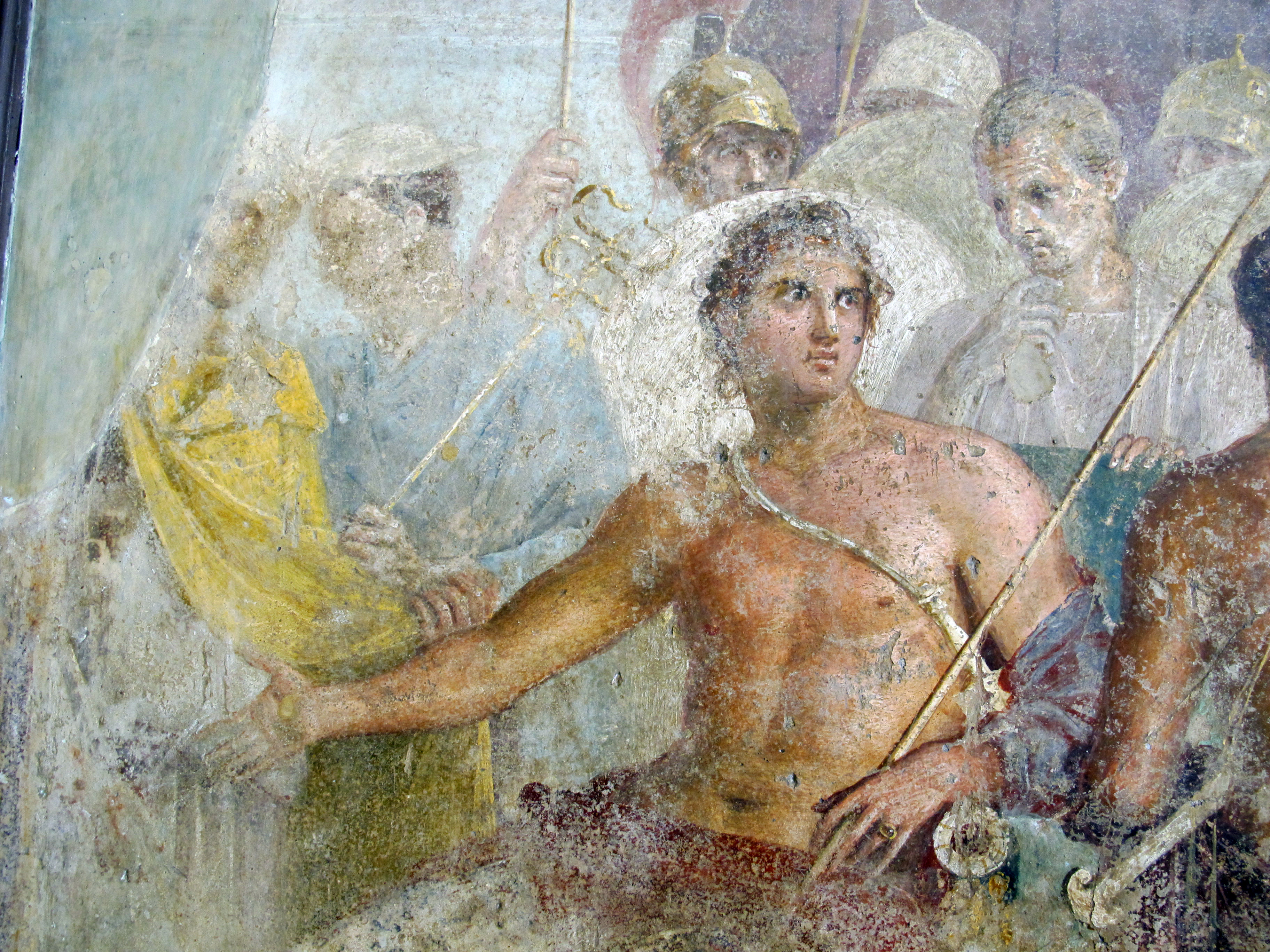 Ancient Roman frescos in the Museo Archeologico (Naples)